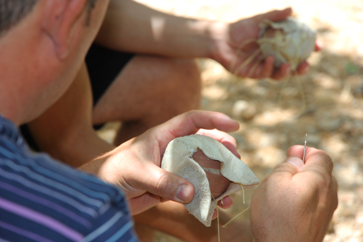 Las pelotas que se usan en el trinquet de Abdet se cosen a mano